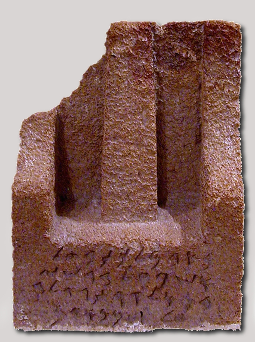 Stèle du tophet de Salammbô, Musee du Bardo (Tunis)